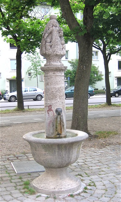 Schutzmantelmadonna-Brunnen am Mariahilfplatz in Muenchen